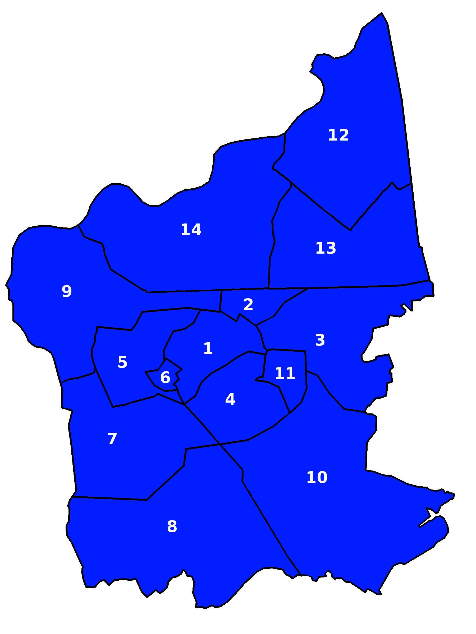 Mapa przedstawiająca osiedla w Bochni.